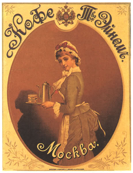 Товарищество "Эйнем". Коробка кофе. До 1917 года.